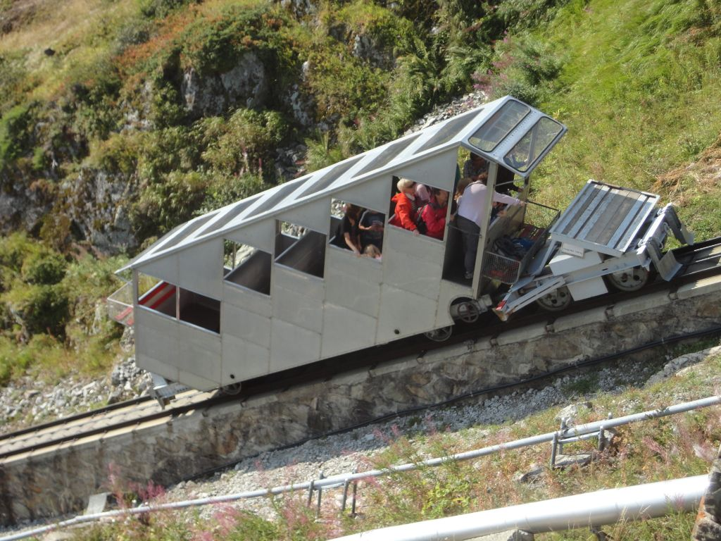 Historische Standseilbahnkabine des "Parc d'Attractions du Châtelard" mit voran geschobenem Ballastwagen am 08.09.2012, kurz unterhalb der Bergstation "Les Montuires". Bild: Thomas Brändle, Schweiz